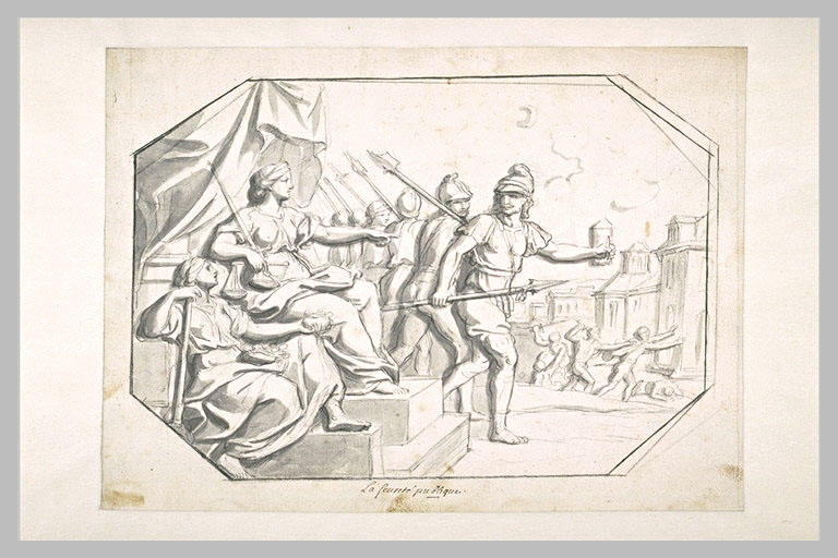 La Police et la sûreté rétablies dans Paris, 1665. Charles Le Brun. Esquisse pour la Galerie des Glaces (détail). Château de Versaille. 4e quart 17e siècle